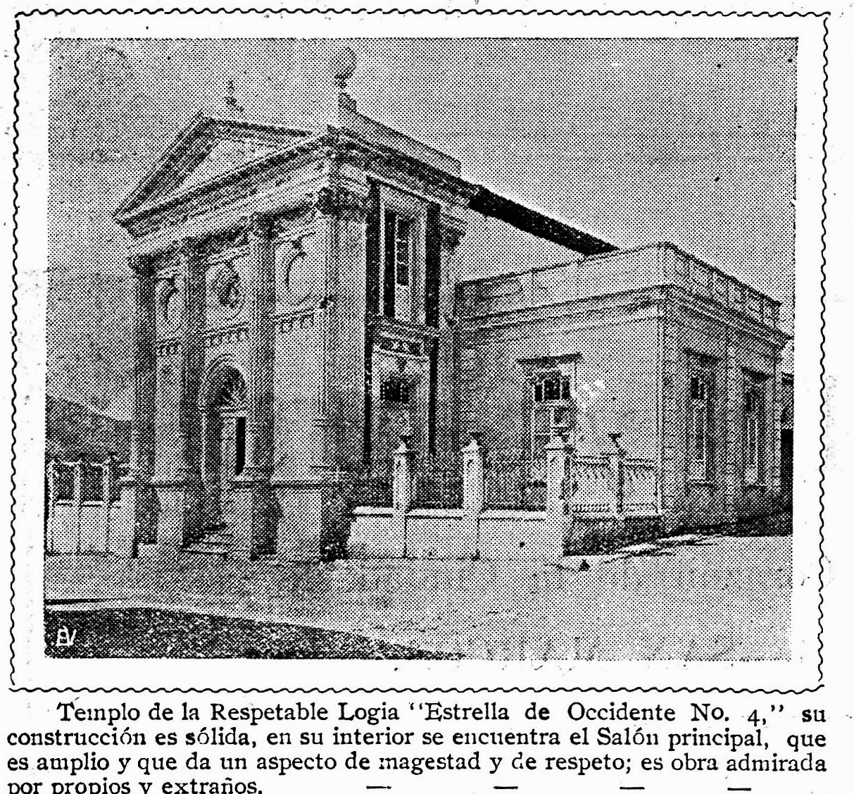 Templo masónico de Occidente N.° 4 en San Marcos.